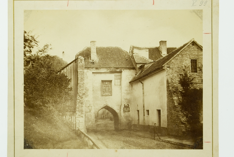 Harjuvärav